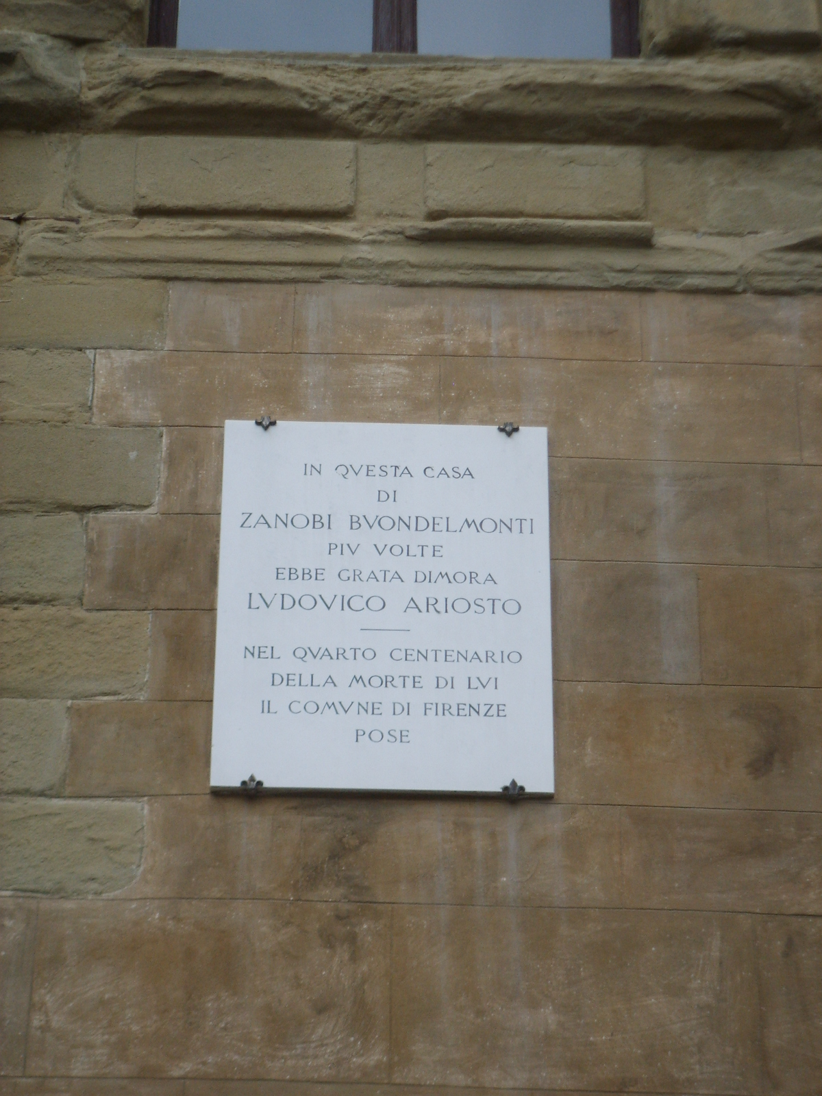 Palazzo buondelmonti, targa ludovico ariosto e zanobi buondelmonti